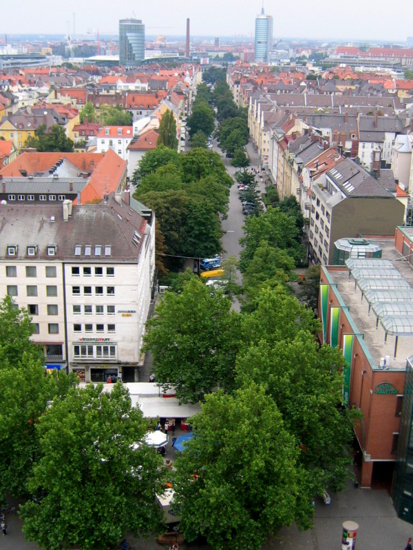 Die Donnersbergerstraße in München von Nord nach Süd. Aufgenommen vom Hochhaus der Schwesternschaft des Roten Kreuzes am Tag des Denkmals 2008. Im Vordergrund: Rotkreuzplatz.